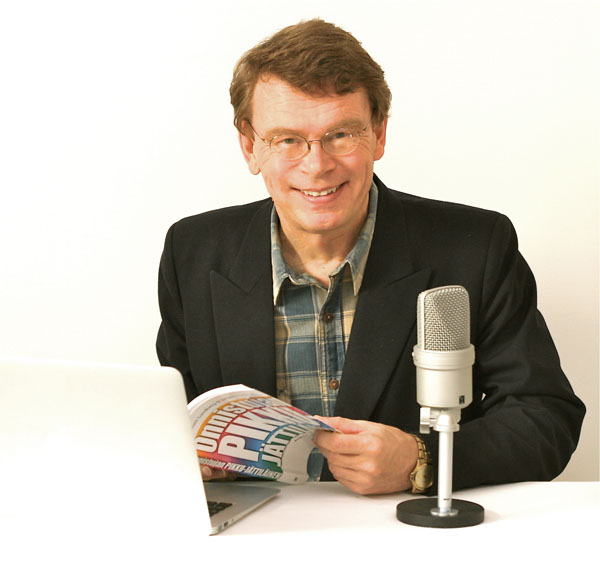 Tom Lundberg.